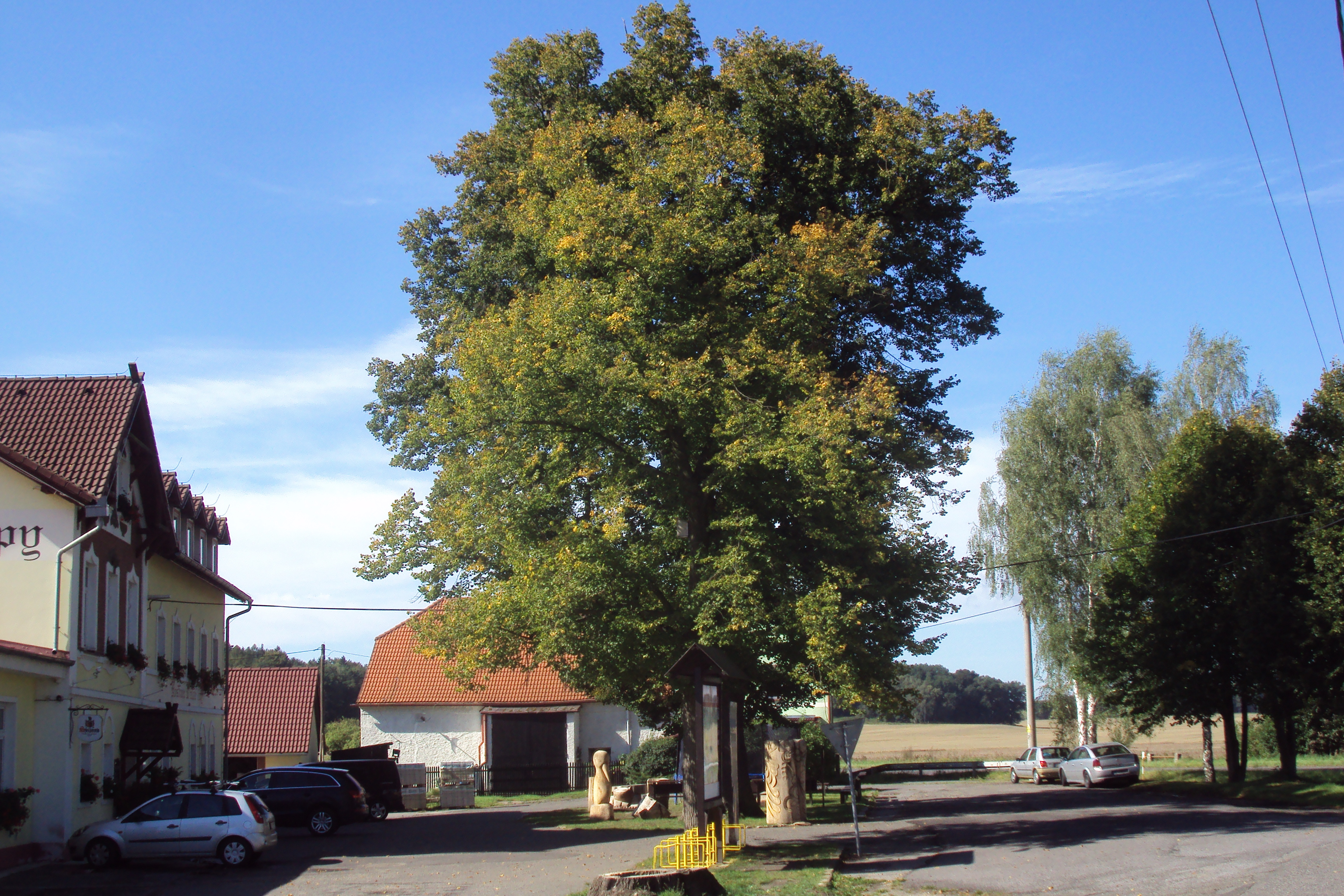 Památná lípa na okraji obce Noviny pod Ralskem, před Hostincem U zlaté lípy